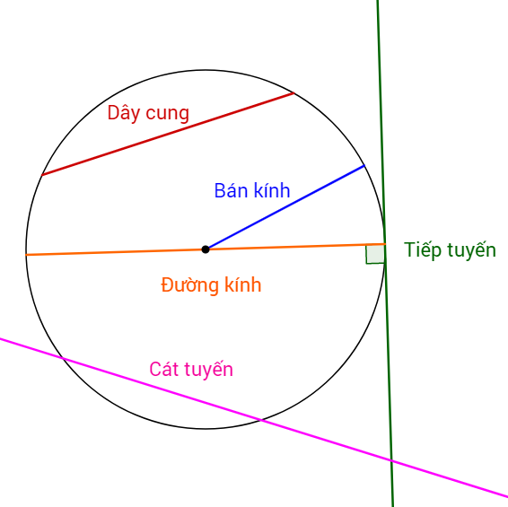 Các đường thẳng trong đường tròn